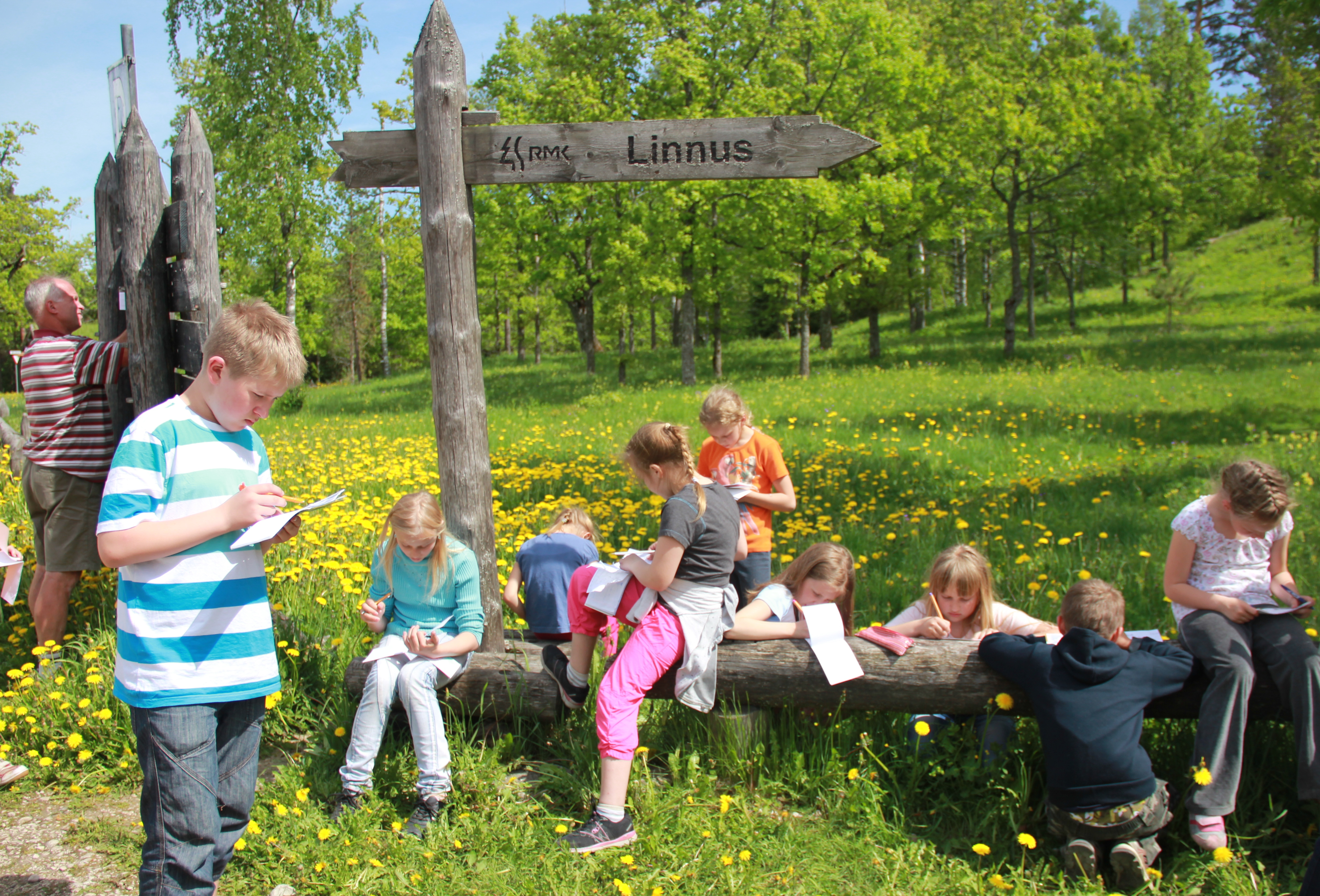 Varbola linnuses täidavad õpilased oma reisivihikut, et õppeaasta lõpuekskursioonist jääks ilus mälestus ja kogunenud teadmised kaotsi ei läheks!